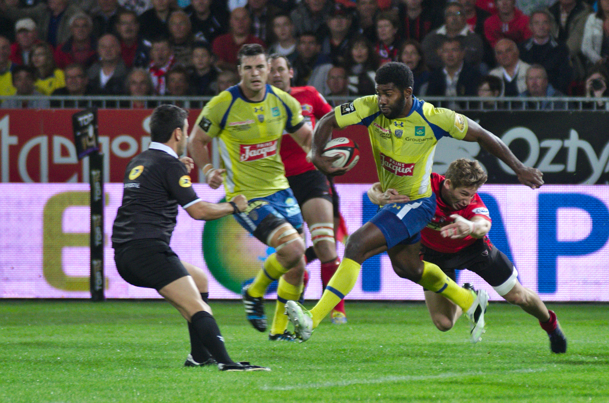 USO-ASM - 20140927 - Tentative de placage sur Noa Nakaitaci par Florian Denos - Cédric Marchat (Arbitre)